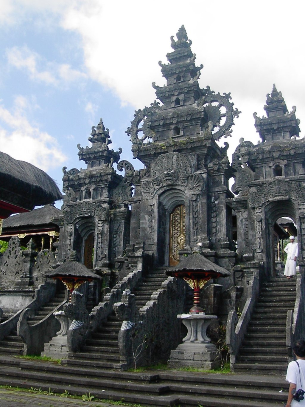 Portal des Haupttempels der Tempelanlage Besakih auf Bali